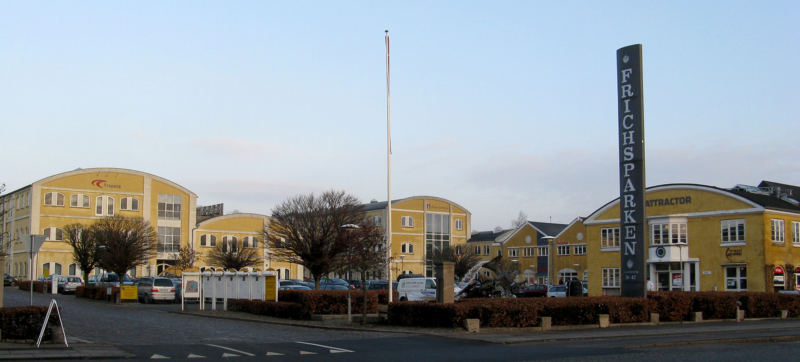 Den tidligere Frichs Masikfabrik i Århus, er i dag erhvervspark